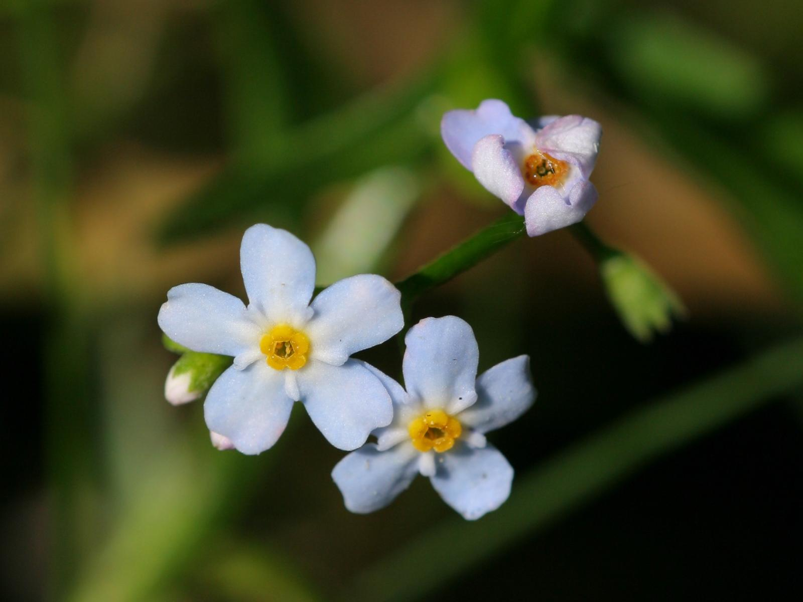 Rasen-Vergissmeinnicht (Myosotis laxa)